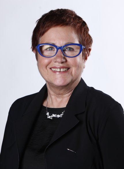 Portrait - campagne régionale 2015 - Nord Pas de Calais Picardie